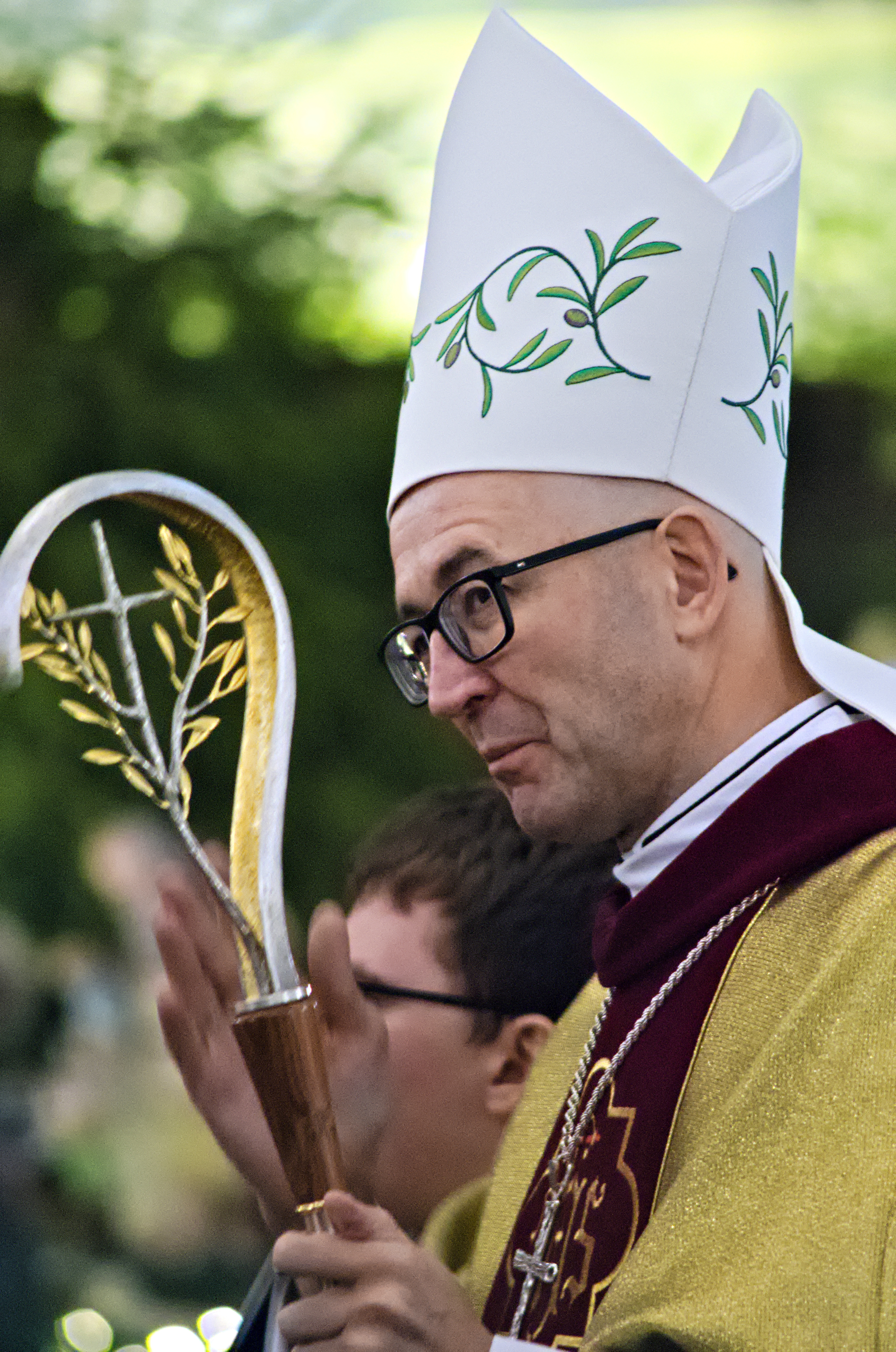 biskup Adrian Galbas (1968– ) w mitrze i z pastorałem podczas procesji wejścia (w nawie głównej) na jego biskupiej mszy świętej prymicyjnej w kościele Najświętszego Serca Pana Jezusa w Bytomiu-Szombierkach